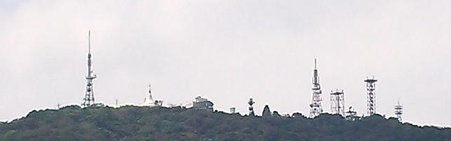 眉山送信所/徳島県徳島市眉山